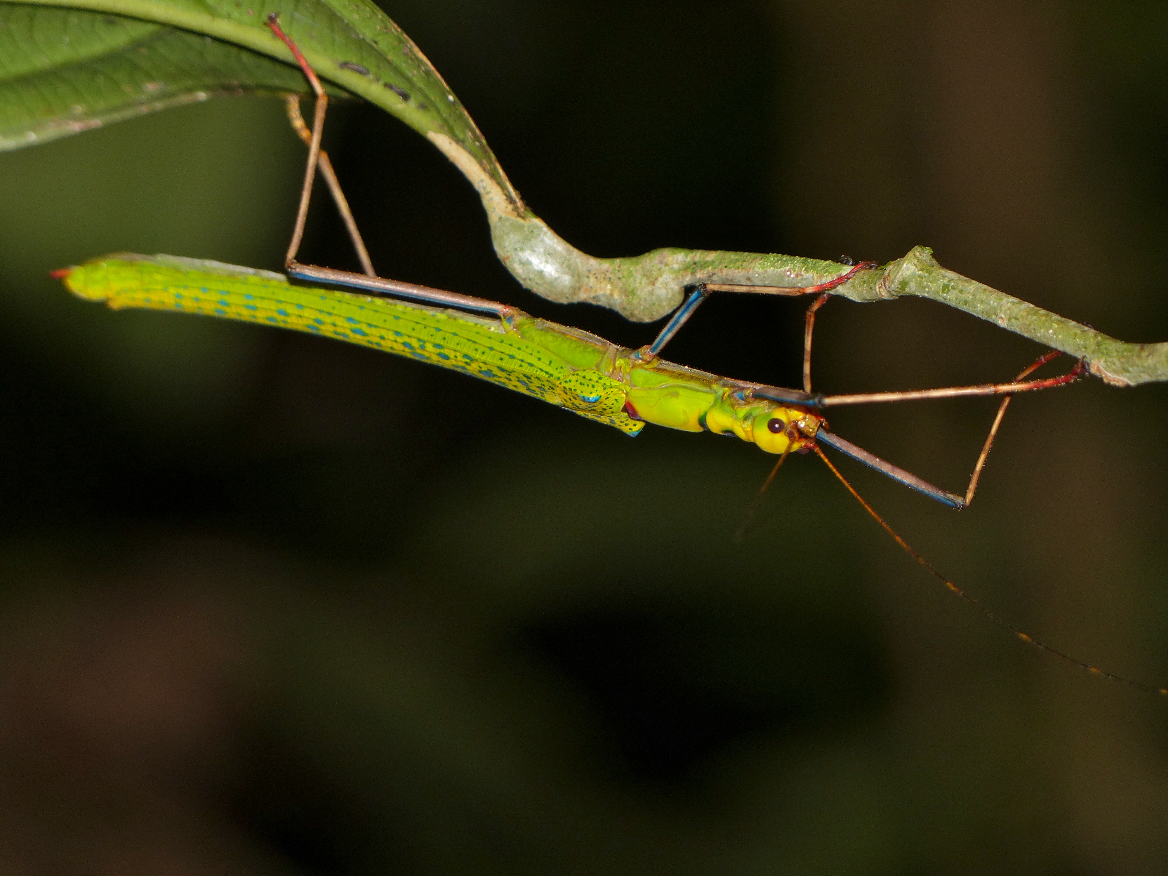 Night Walk Trail, Mulu NP, Sarawak, MALAYSIA